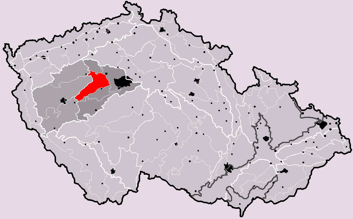 Poloha geomorfologického celku Křivoklátská vrchovina v rámci České republiky. Hercynský systém Hercynská pohoří I Česká vysočina I5 (V) Poberounská subprovincie I5A (VA) Brdská oblast I5A-3 (VA-3) Křivoklátská vrchovina